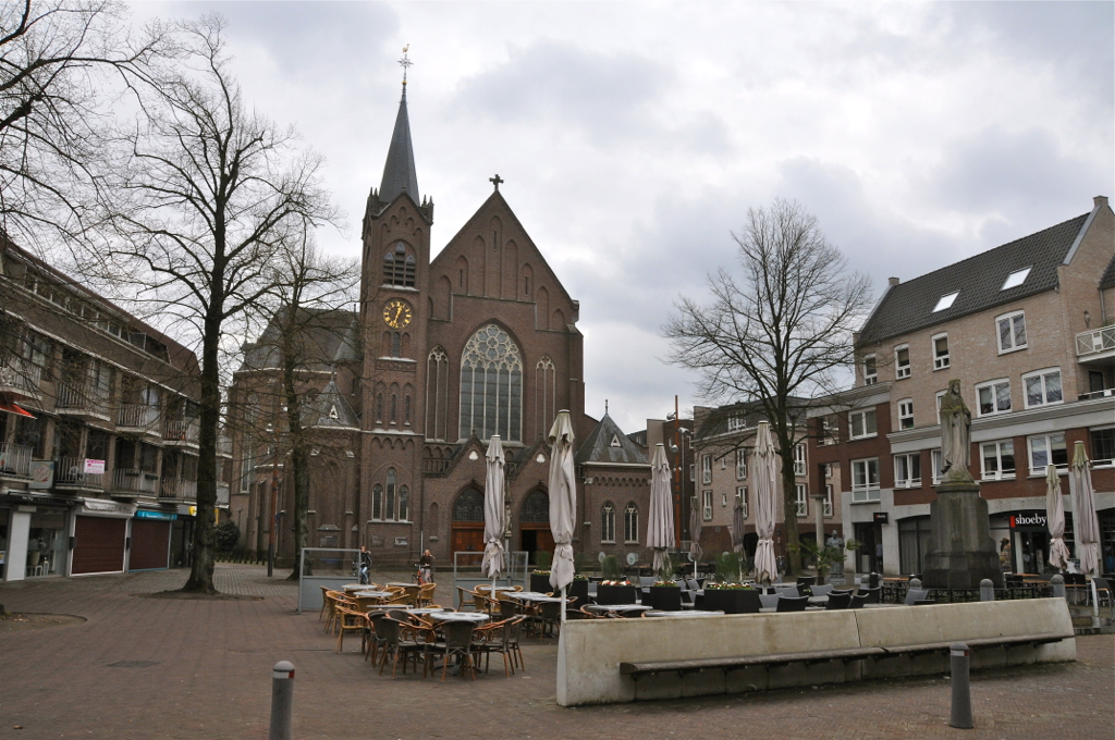 De Sint Martinuskerk verving een gelijknamige kerk uit 1808, die destijds de middeleeuwse Sint Odakerk verving en in 1912 werd gesloopt. Van de St. Odakerk resteert nog het hoogkoor uit 1498, nu een zijkapel van het koor. De huidige kerk werd ontworpen in neogotische stijl door architect W.Th. van Aalst. De kerk werd in de huidige vorm voltooid in 1915. Plannen voor een grote toren werden niet uitgevoerd; in plaats daarvan kreeg de kerk een kleine toren. Op het kerkhof achter de kerk staat sinds 1934 een door Marinus Jan Granpré Molière ontworpen kapel, toegewijd aan de heilige Oda. De naam Sint Oedenrode is met deze heilige verbonden.